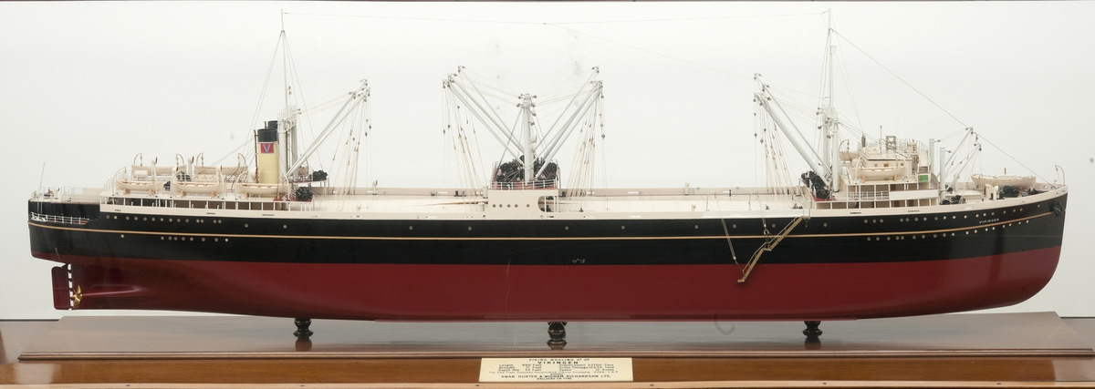 Modell av det flytende hvalkokeriet Vikingen